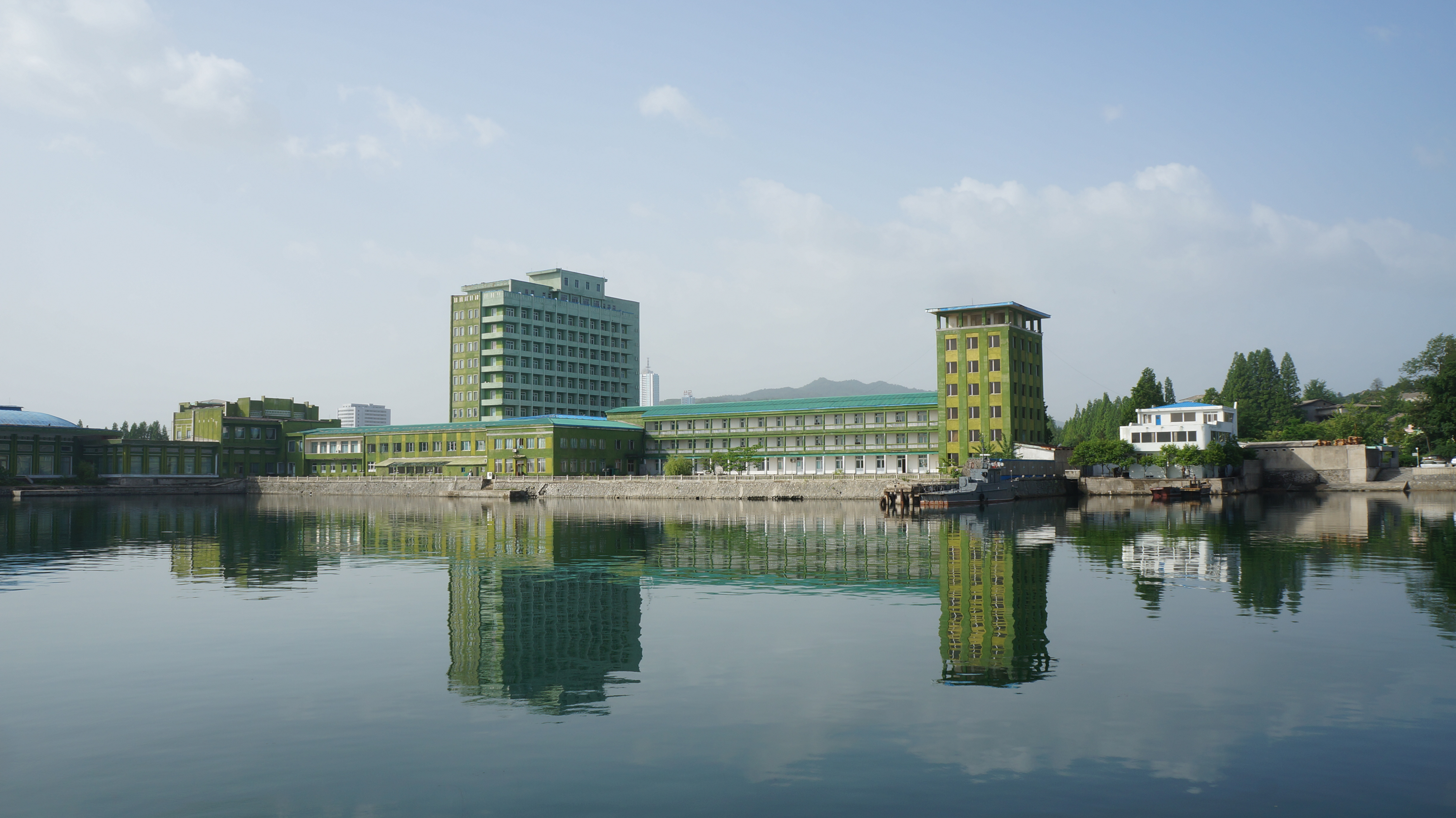 Wonsan